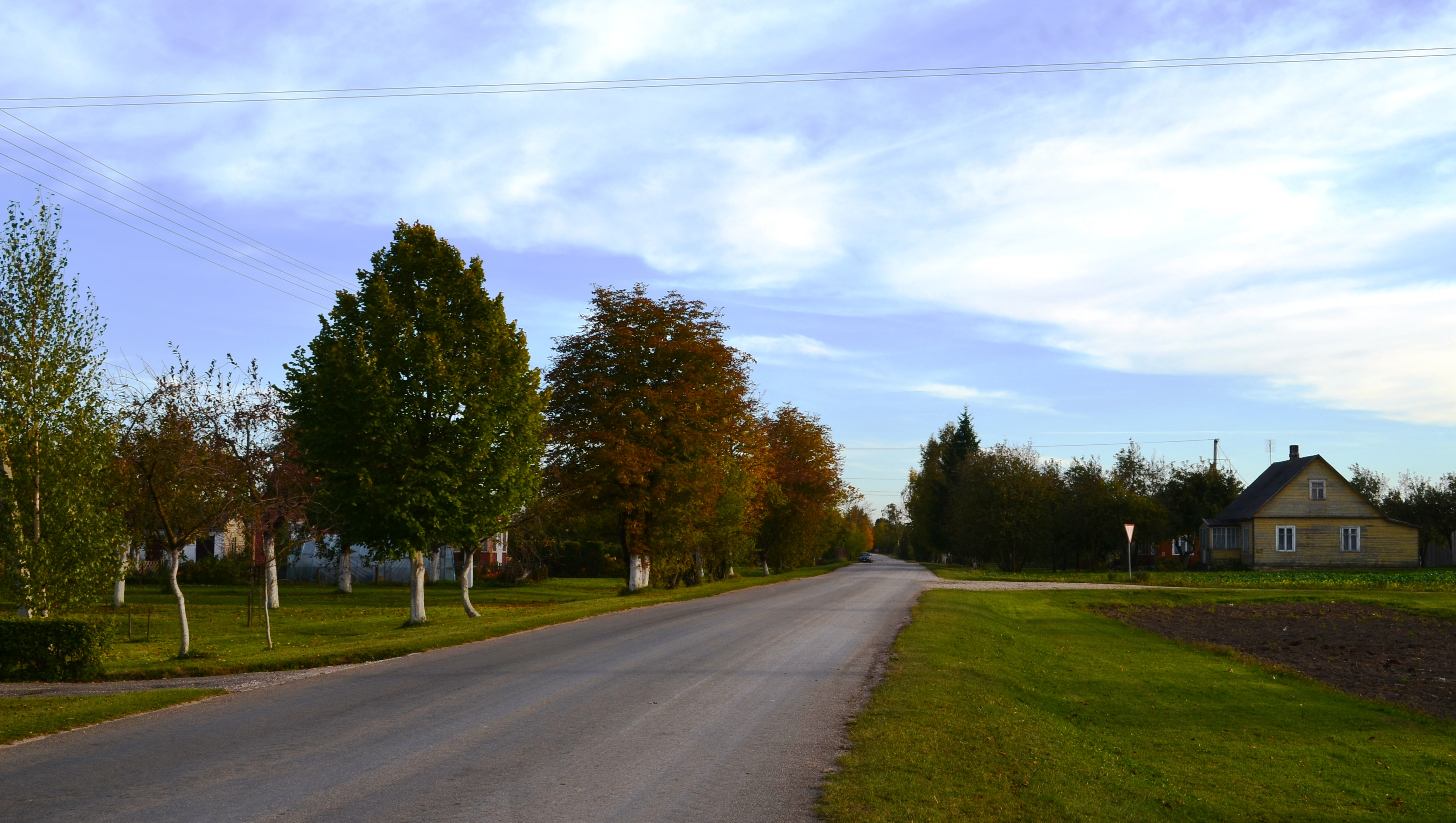 Devynduoniai, Gudžiūnų sen., Kėdainių raj.